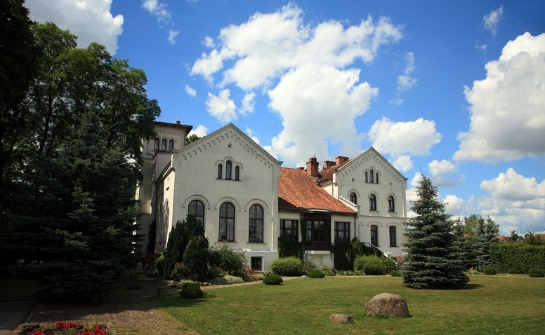 Osieka – wieś w woj. warmińsko-mazurskim, w powiecie bartoszyckim, w gminie Bartoszyce